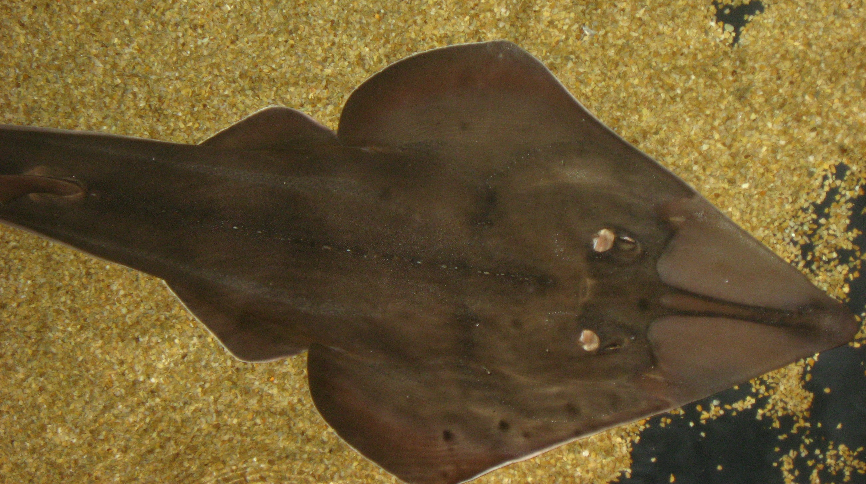 Rhinobatos cemiculus in Nausicaä Centre National de la Mer